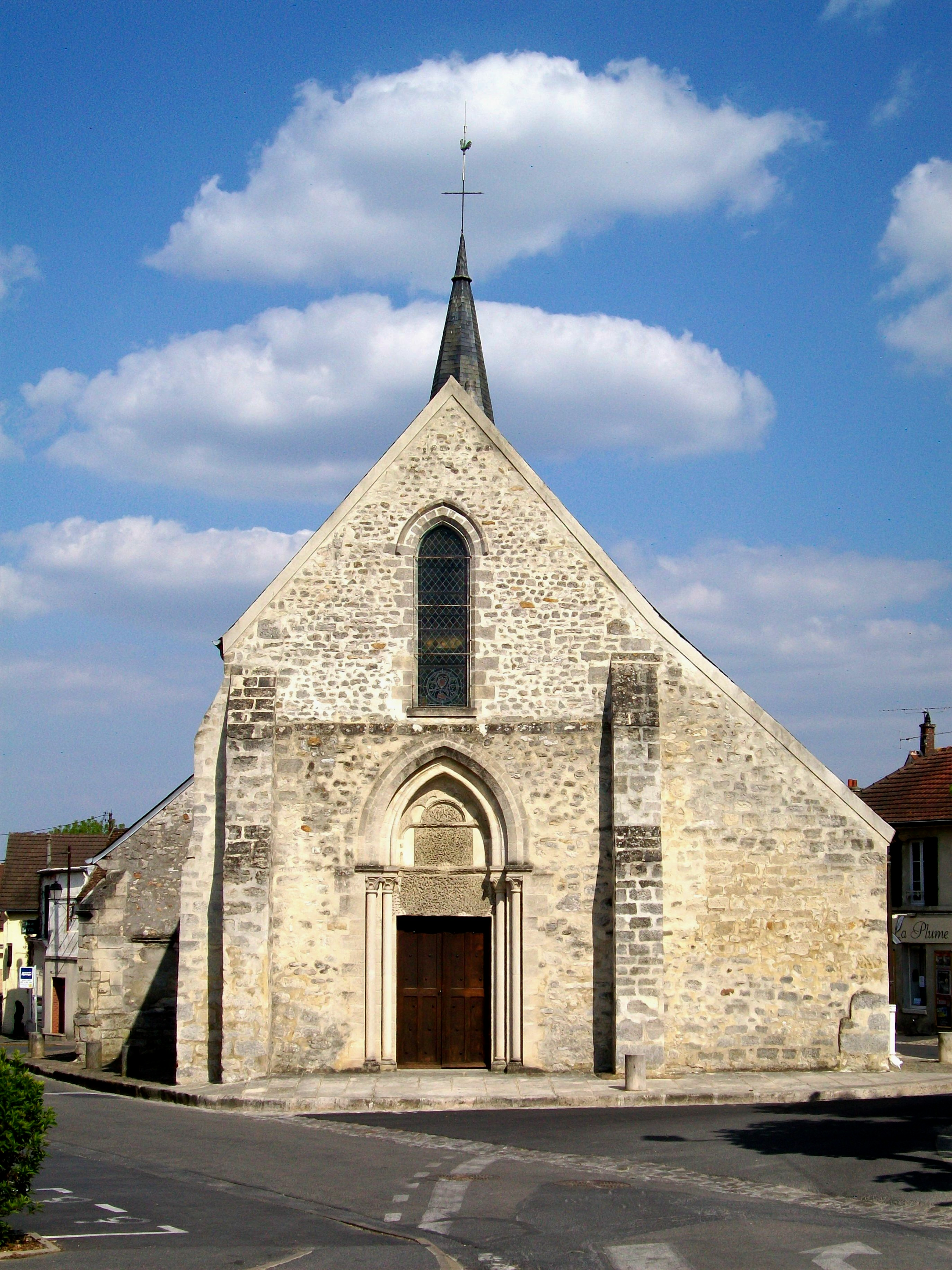 Portail de l'église Notre-Dame d'Orry-la-Ville.